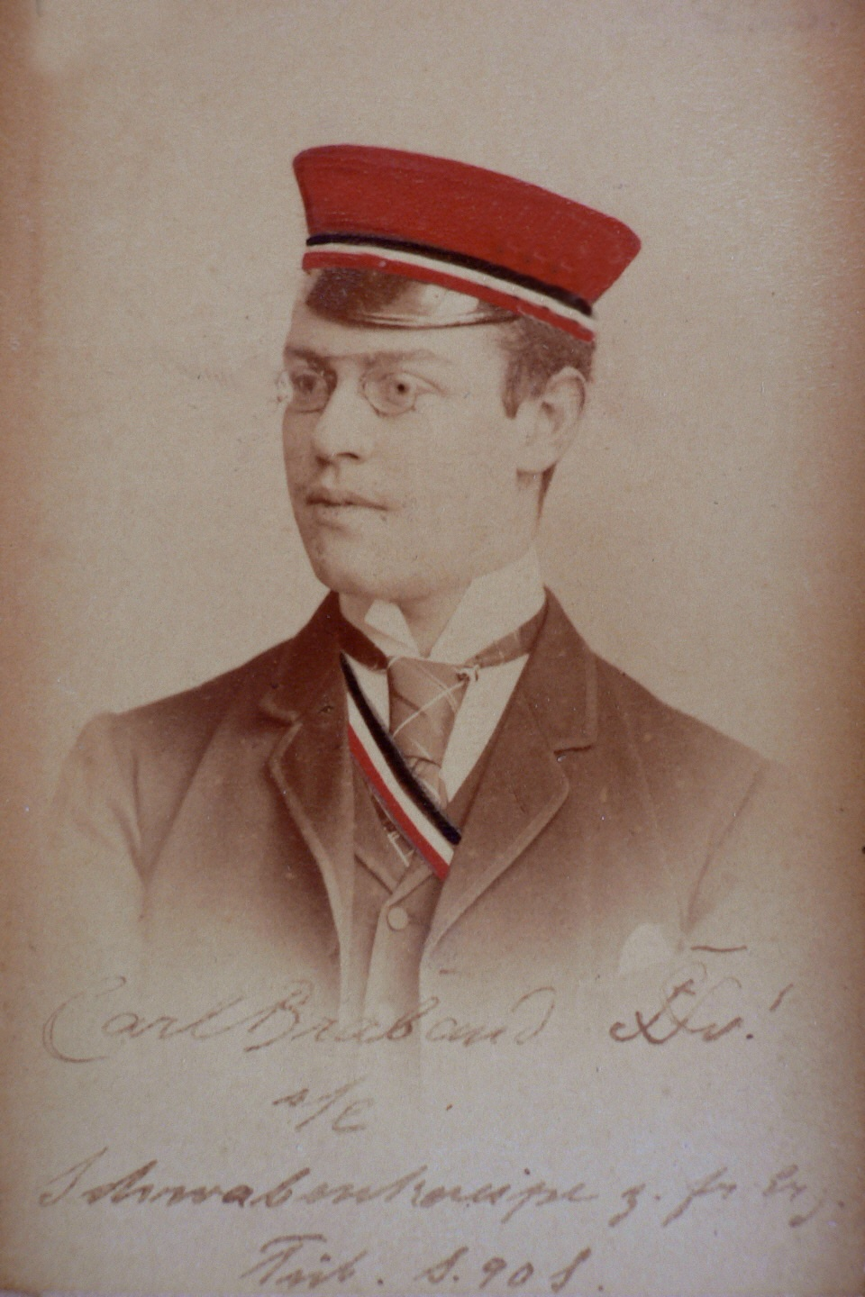 Porträtfotografie von Carl Braband als Aktivem des Corps Suevia Tübingen